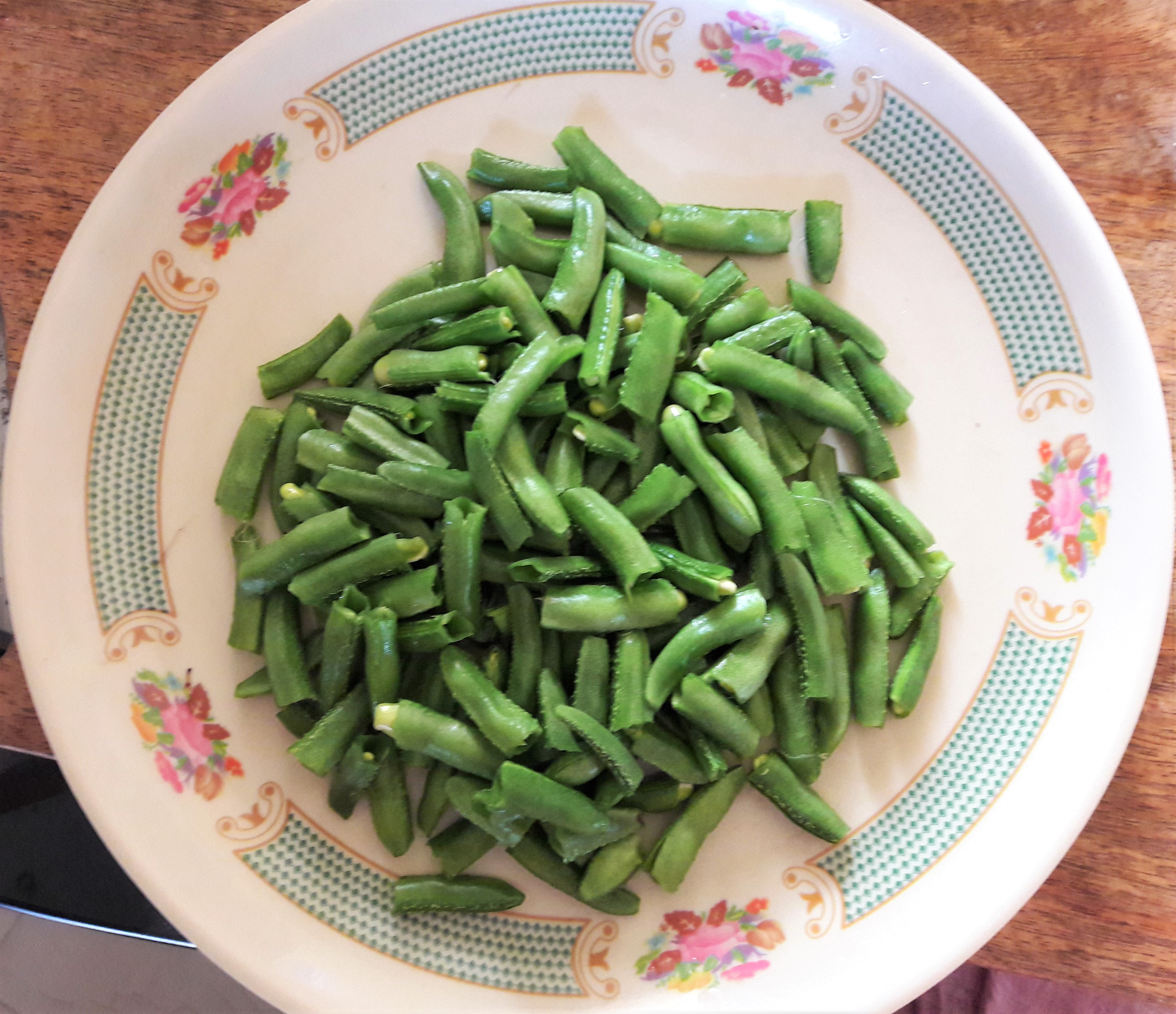 చిక్కుడుకాయ ముక్కలు